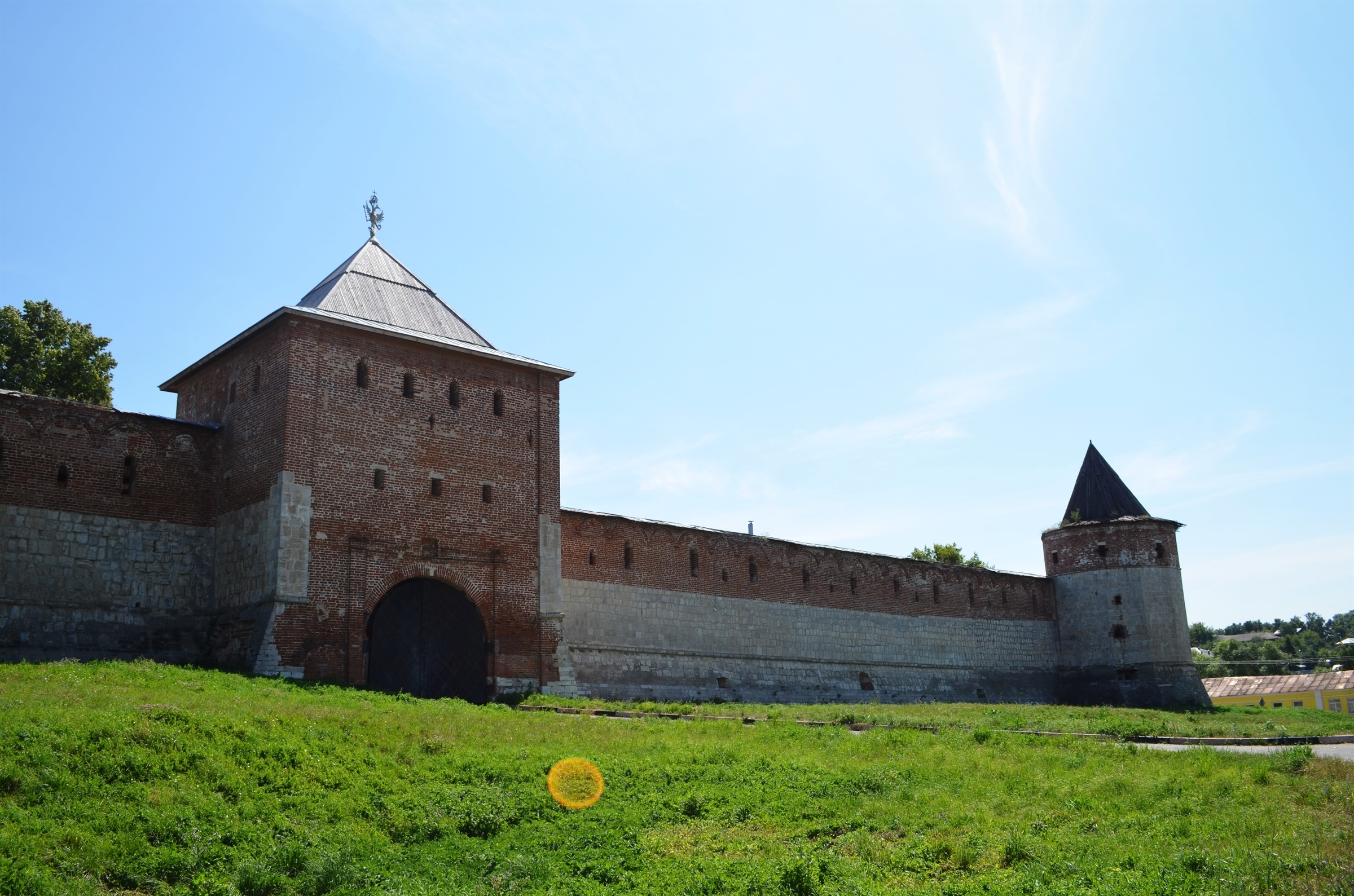 Ворота Богоявленские (Москва и Московская область, Зарайск, улица Музейная)